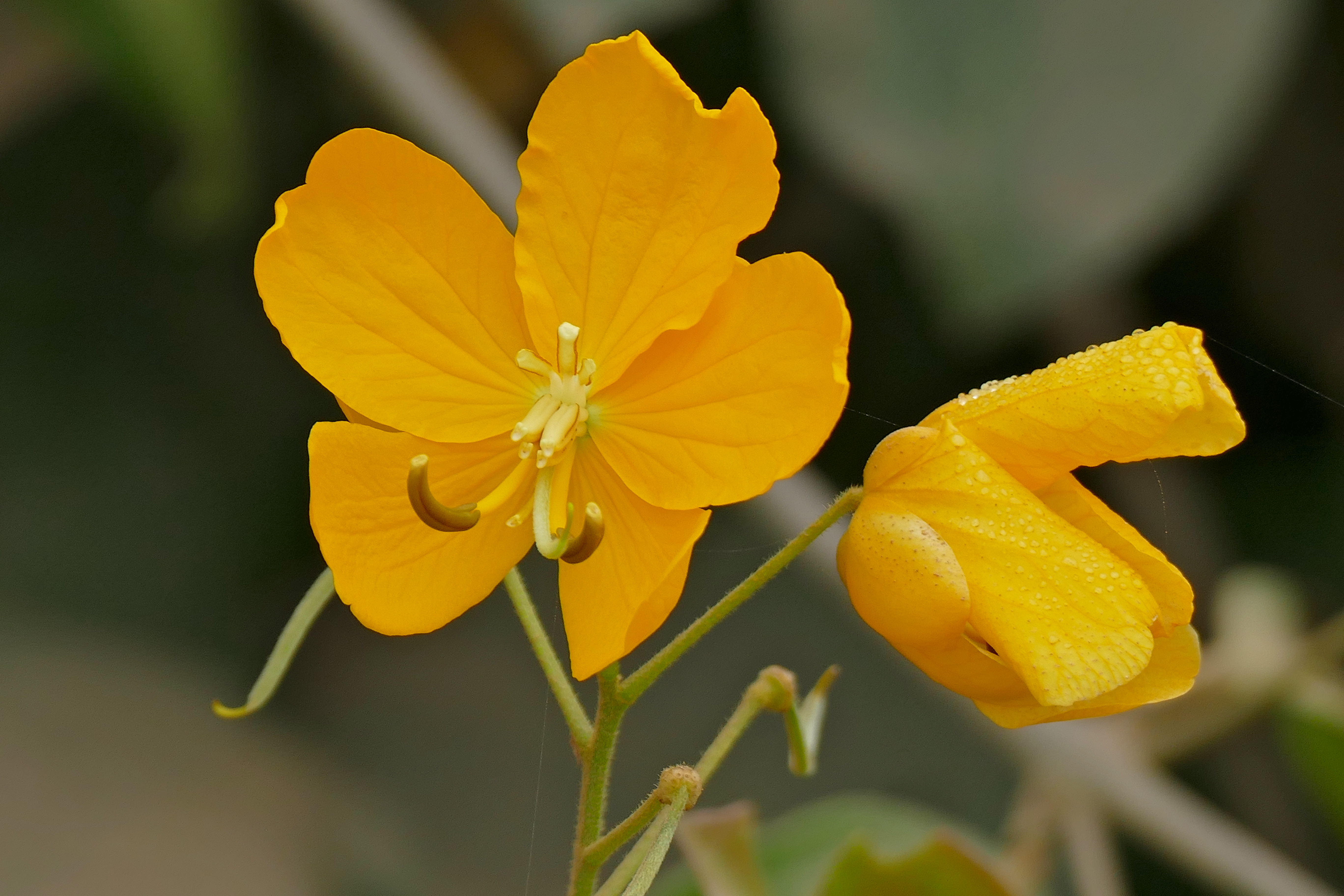 Transpantaneira, Poconé, Mato Grosso, BRAZIL